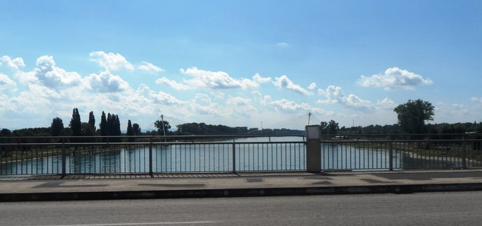 Rhine (Rhine River)